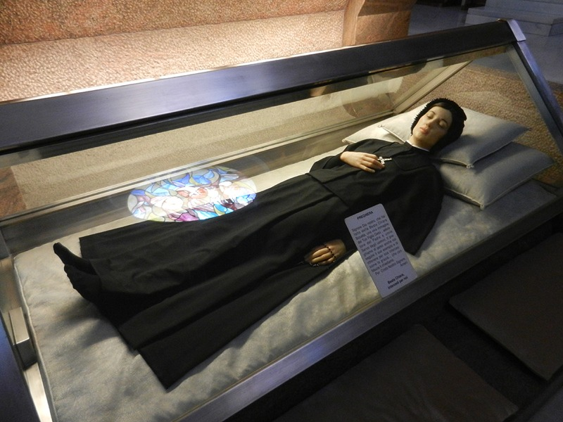 Como - Urna con le spoglie della B. Chiara Bosatta all'interno del Santuario del Sacro Cuore di Gesù